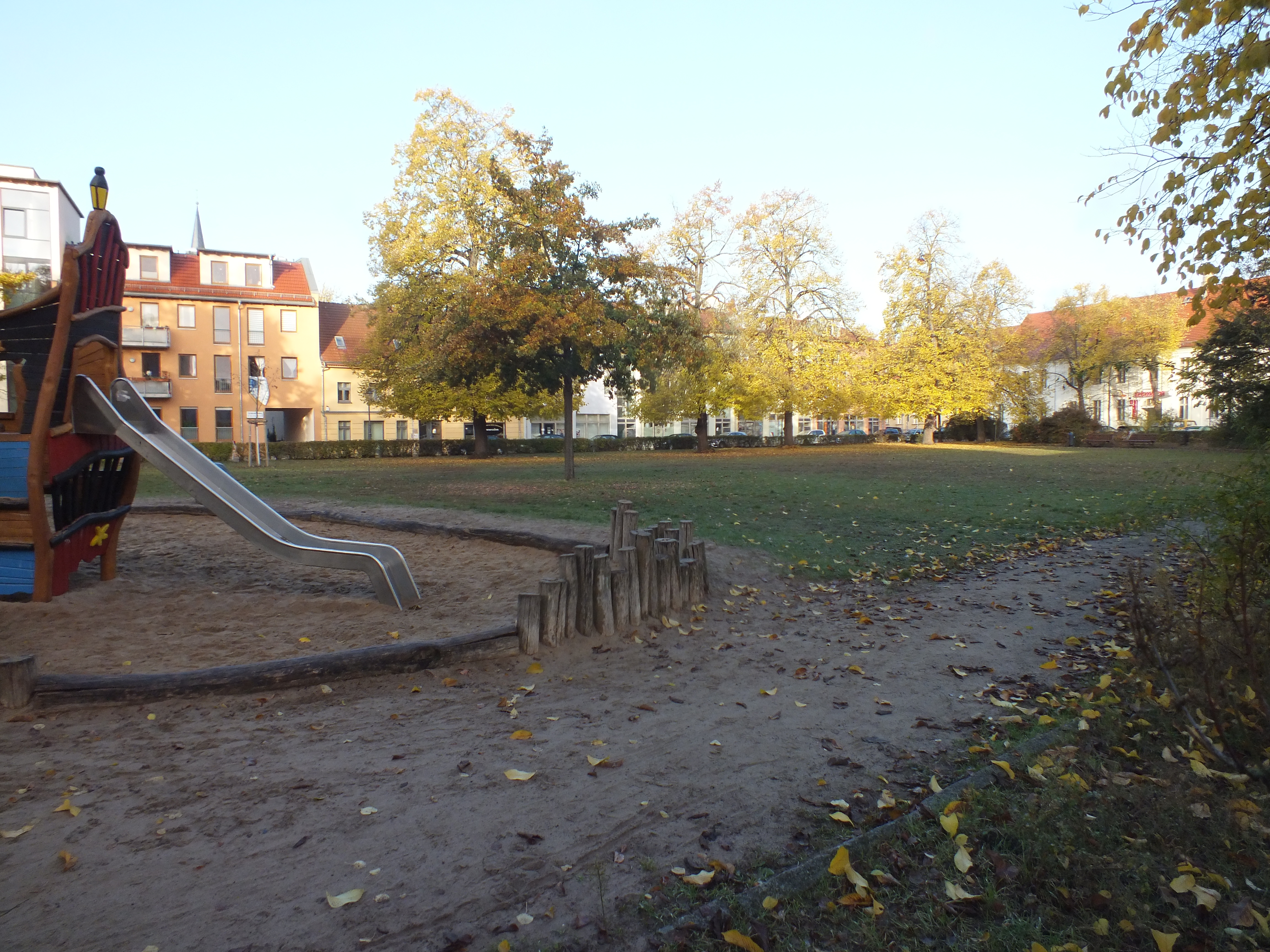 Futranplatz